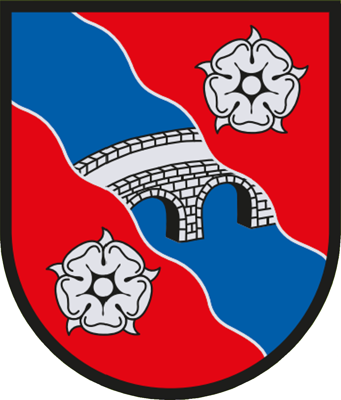 1982 verlieh die Steiermärkische Landesregierung der Gemeinde ein Gemeindewappen. Wegen der Gemeindezusammenlegung verlor das Wappen mit 1. Jänner 2015 seine offizielle Gültigkeit. Die Wiederverleihung erfolgte mit Wirkung vom 18. September 2015.